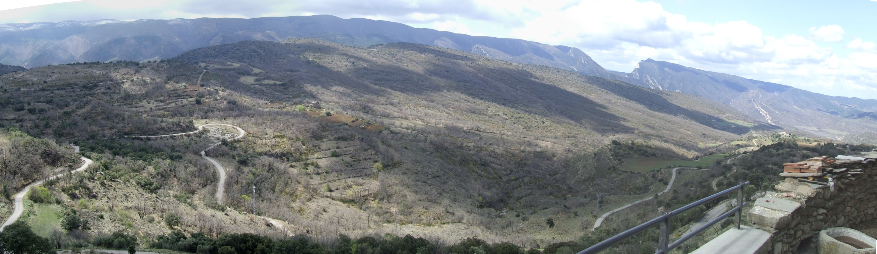 Collada de Vilabella, Tossal de Vilabella i Serra d'Alsamora (Sant Esteve de la Sarga, Pallars Jussà)